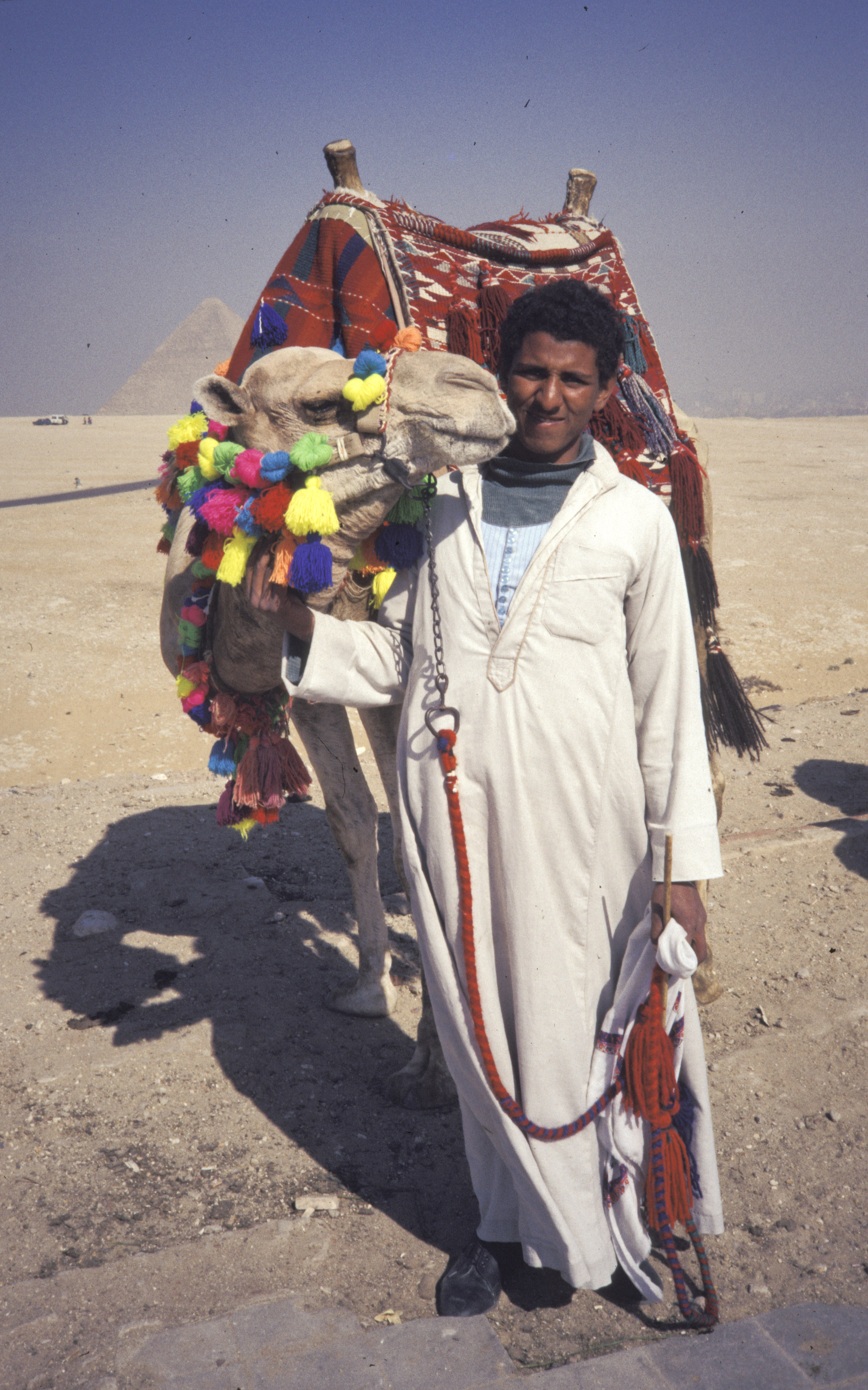 Egypt